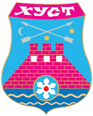 Герб м. Хуст